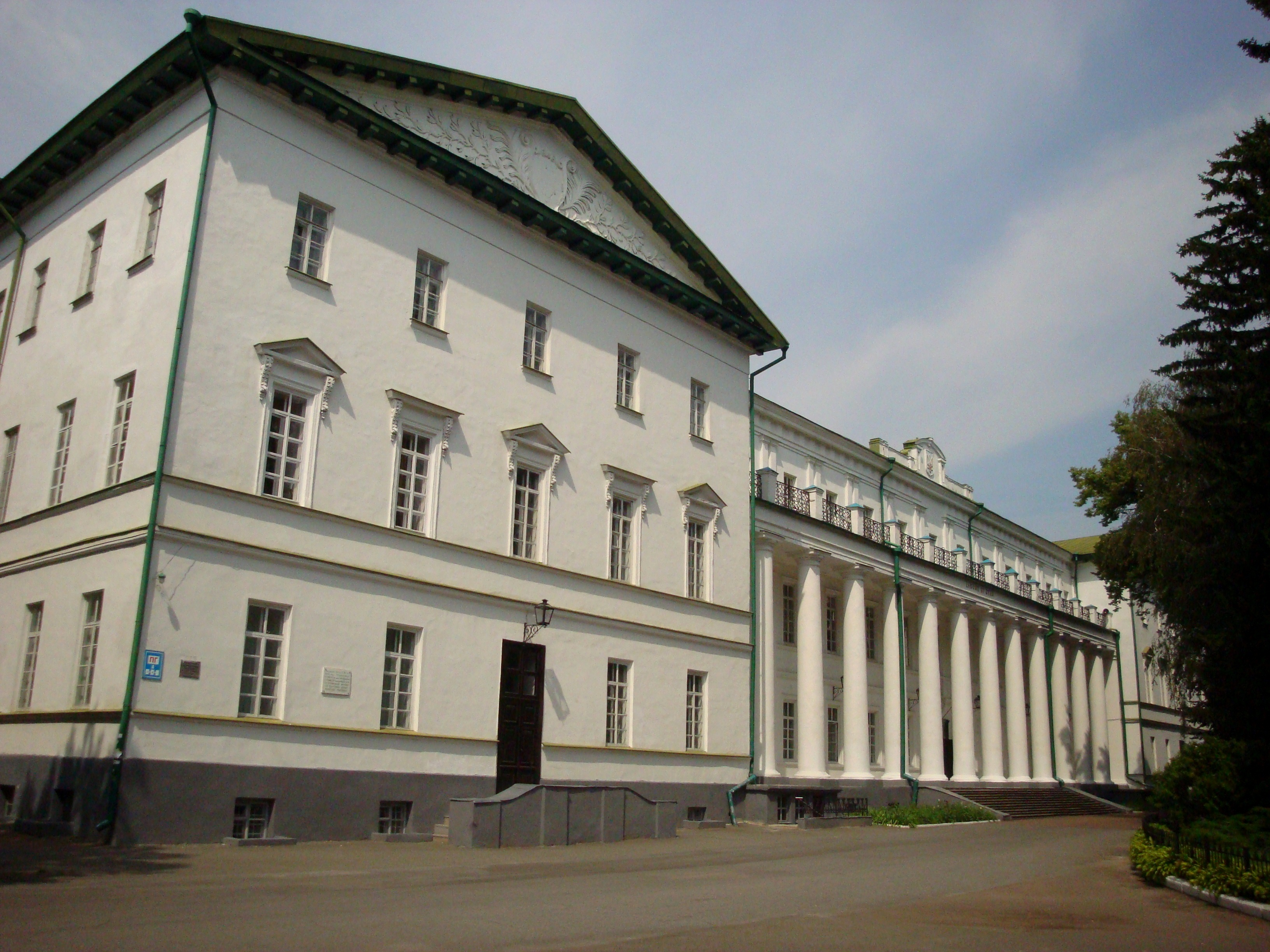 Будинок гімназії, де навчалися Л. І. Глібов, Є. П. Гребінка, М. В. Гоголь та інші видатні діячі, Ніжин, вул.Кропив'янського, 2